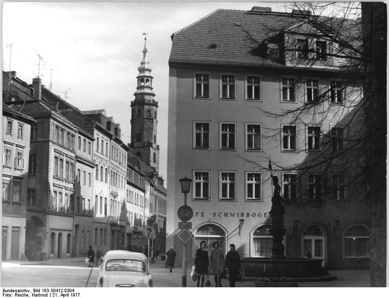 Görlitz, Leninplatz, Brunnen ADN-ZB Reiche 12.4.1977 Bez. Dresden: Der Leninplatz in Görlitz.